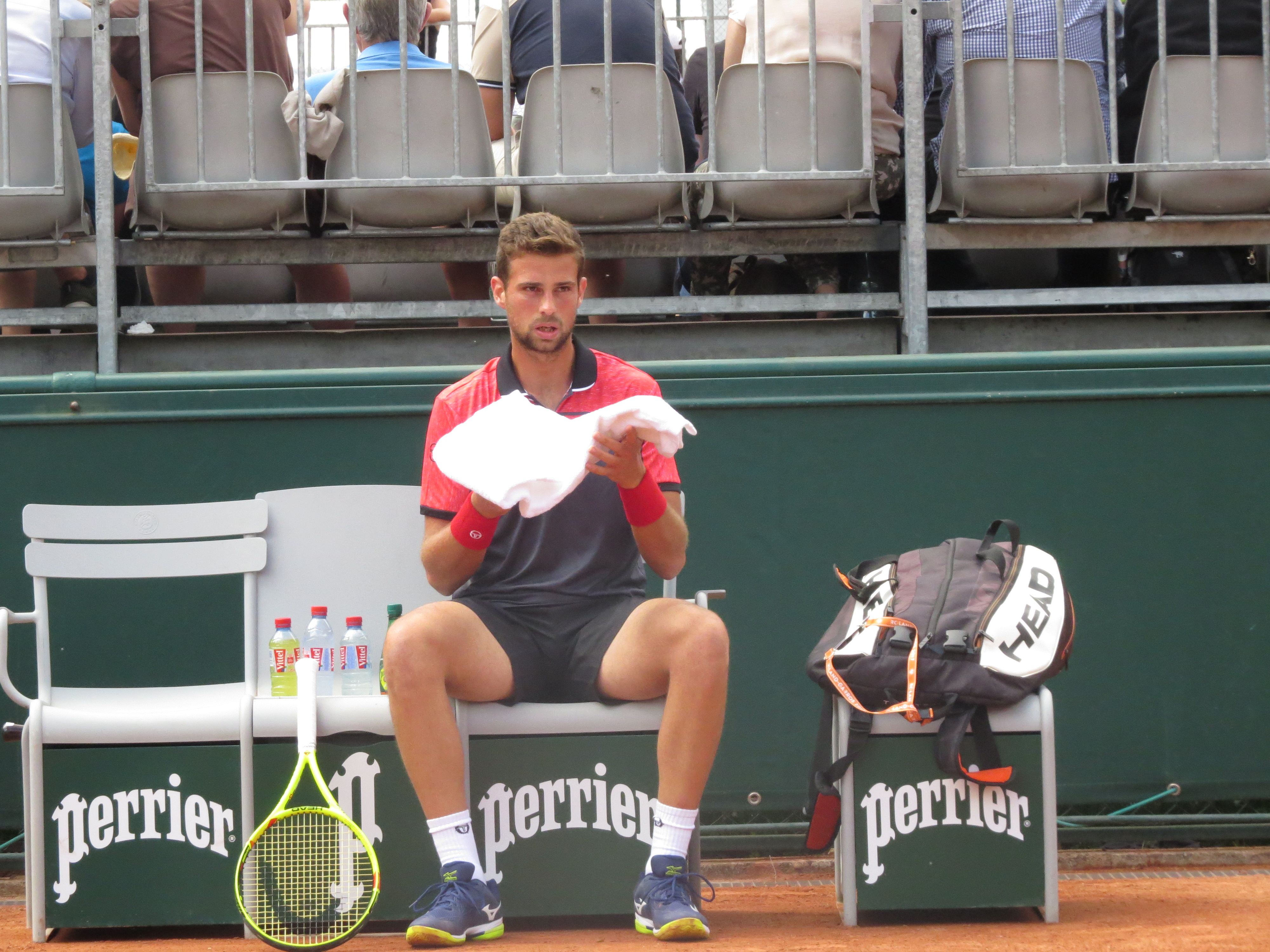 Stefano Napolitano lors de son deuxième tour des qualifications face à Márton Fucsovics (court n°12)